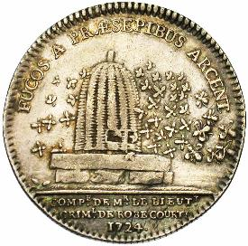 Jetton Francés con imagen de colmena tradicional.